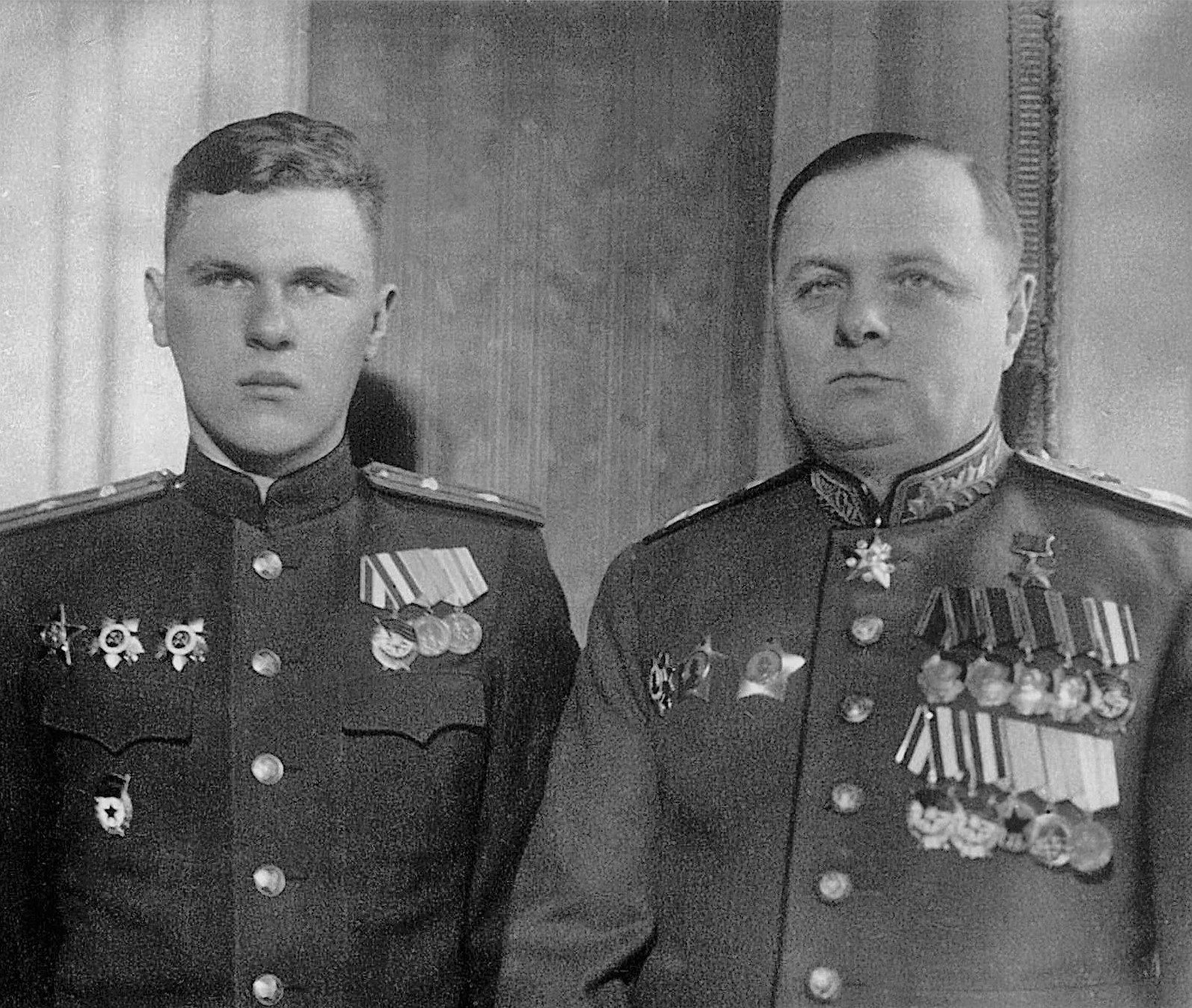 Маршал Советского Союза Герой Советского Союза Кирилл Афанасьевич Мерецков с сыном Владимиром, гвардии майором, слушателем Академии бронетанковых и механизированных войск, перед отъездом на Дальний Восток